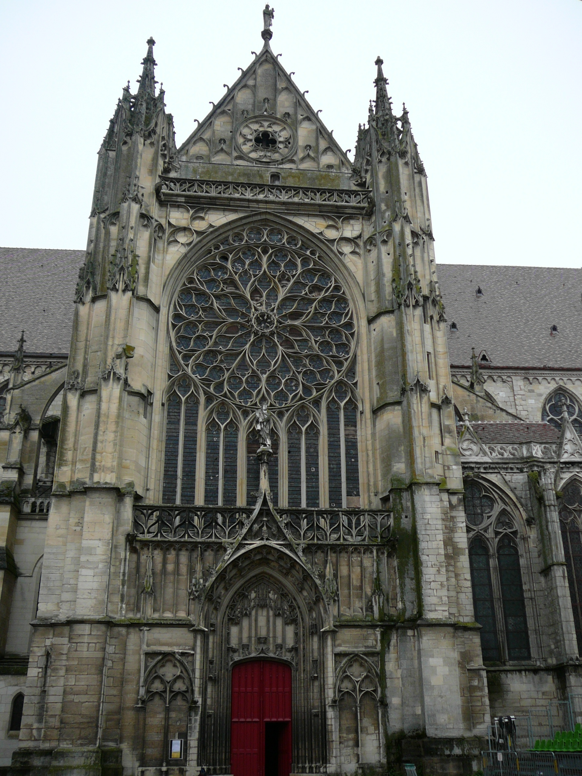 Transept sud de la cathédrale, chef d'oeuvre de Martin Chambiges